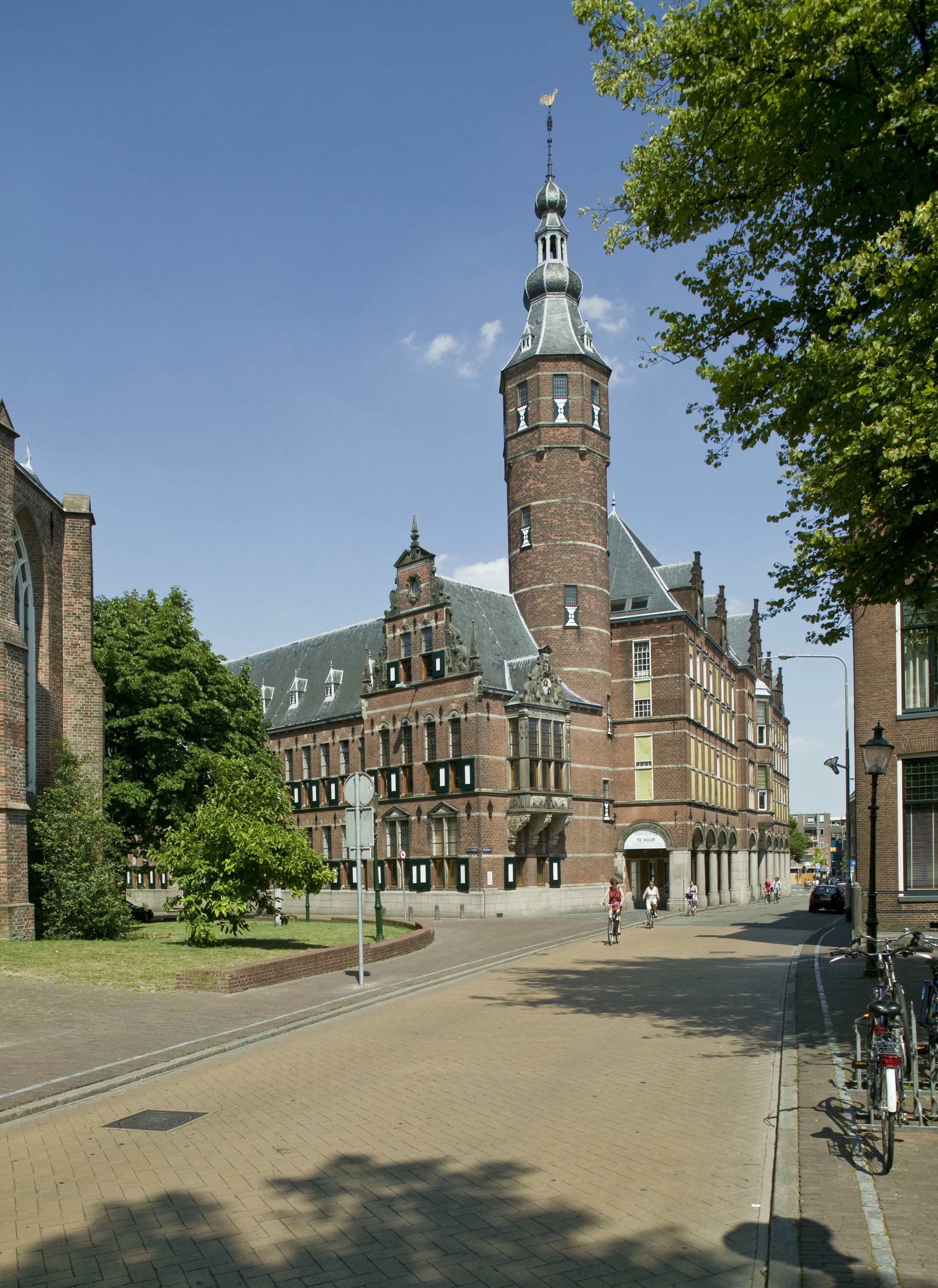 Martinikerkhof/Sint Jansstraat, Groningen, gezien naar het oosten, 2008. Links (met toren) het Provinciehuis (rm 18559/gem.mon. 106770), rechts daarvan het voormalige Rijksarchief (rm 103291).